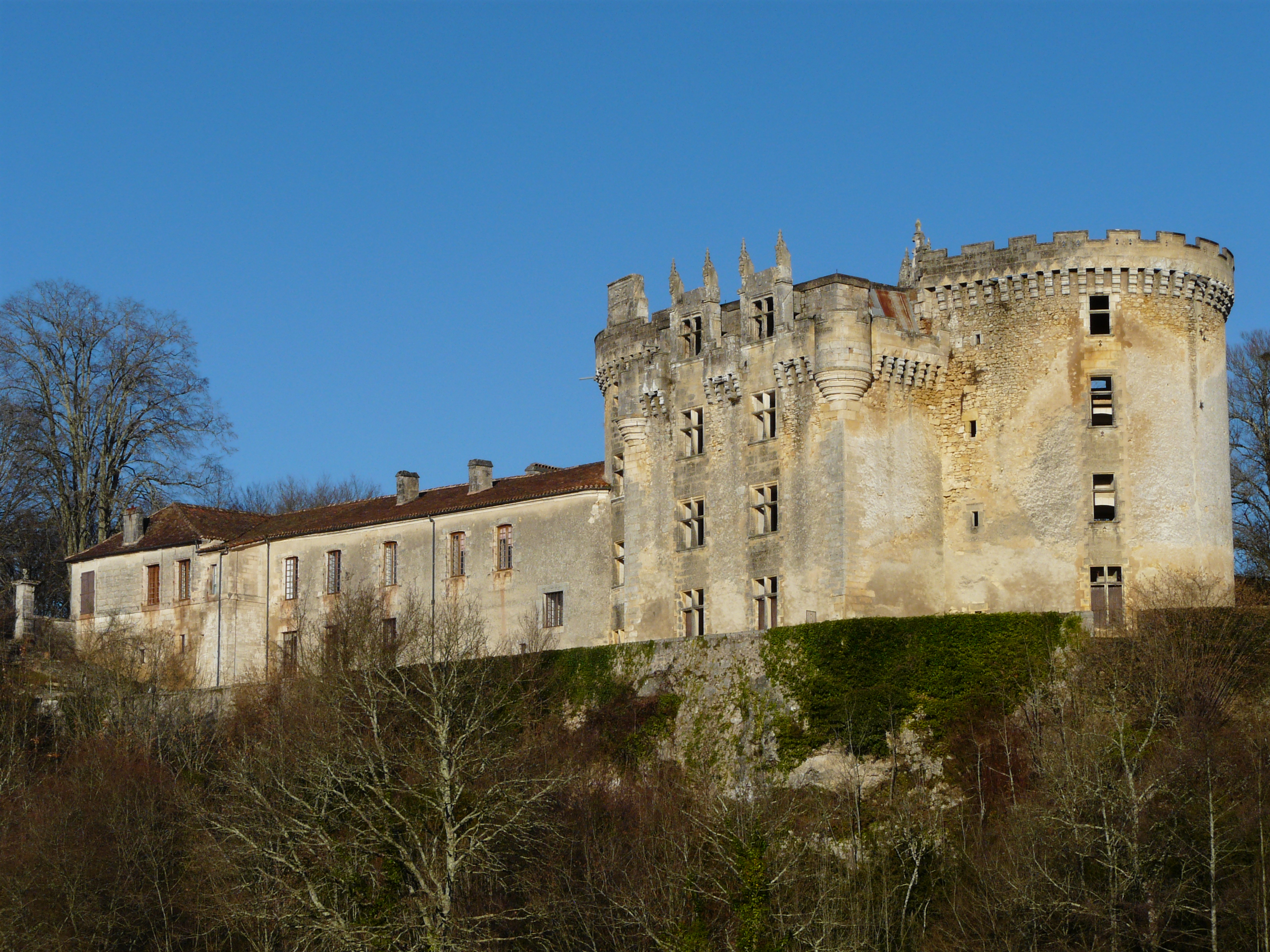 Château de La Chapelle-Faucher, Dordogne, France